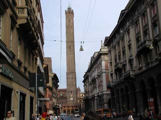 Bologna: die Asinelli Türme aus Rizzoli St.